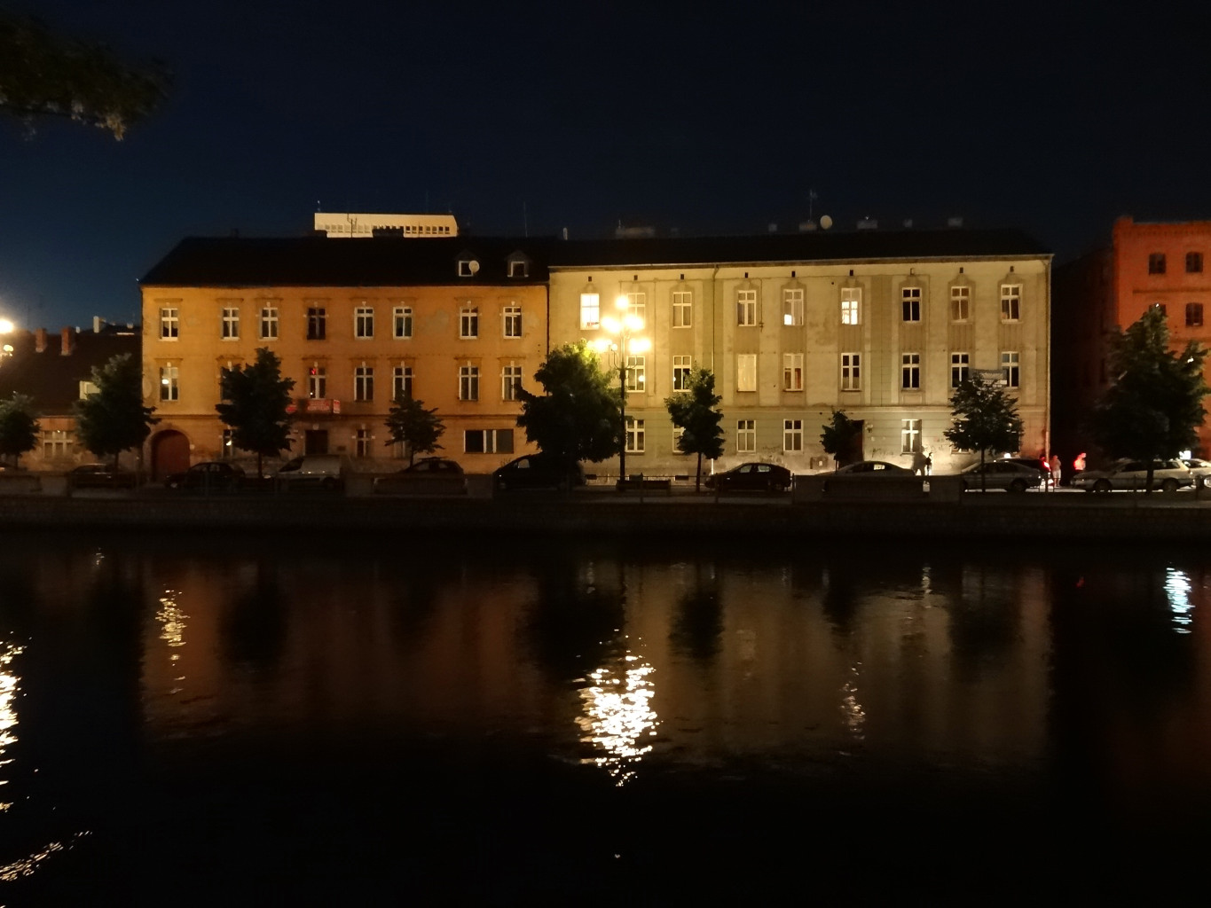 Północne nabrzeże Brdy w centrum Bydgoszczy